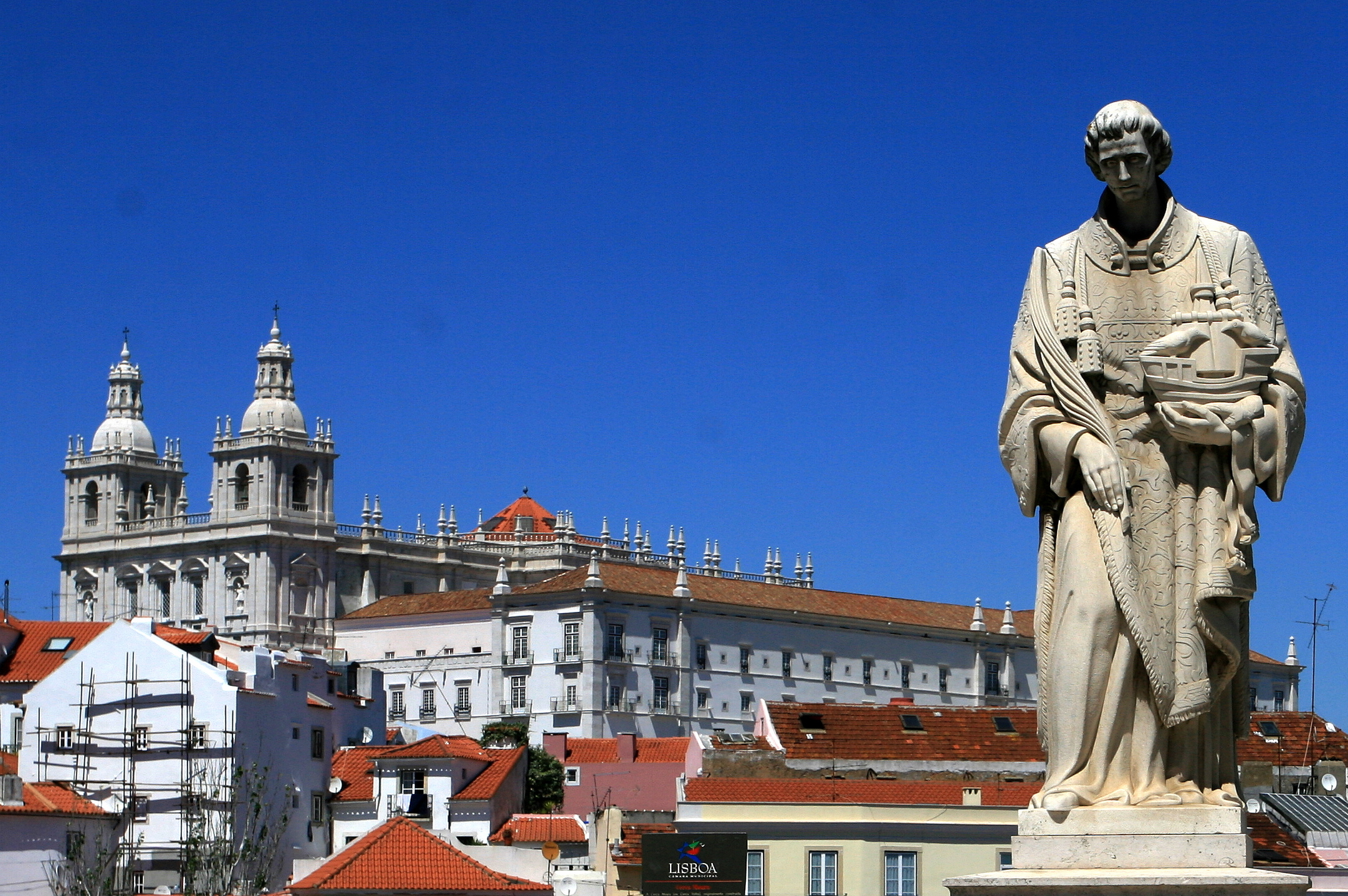 S. Vicente de Fora - Lisboa